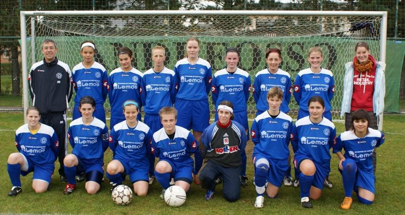 Brun